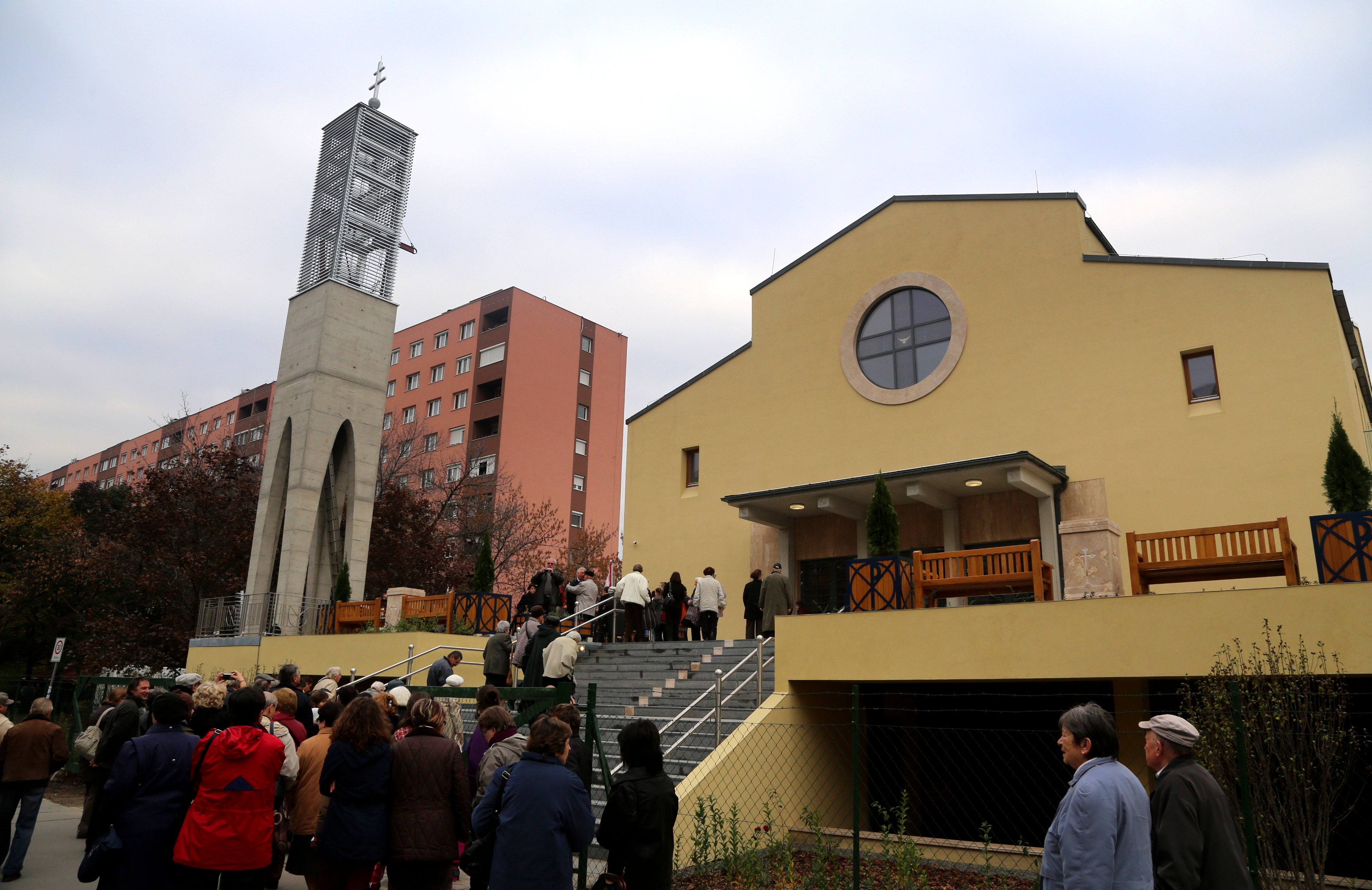 A lágymányosi Szent Adalbert templom. - Budapest, Fehérvári út 88/a, GPS 47.462734,19.04283